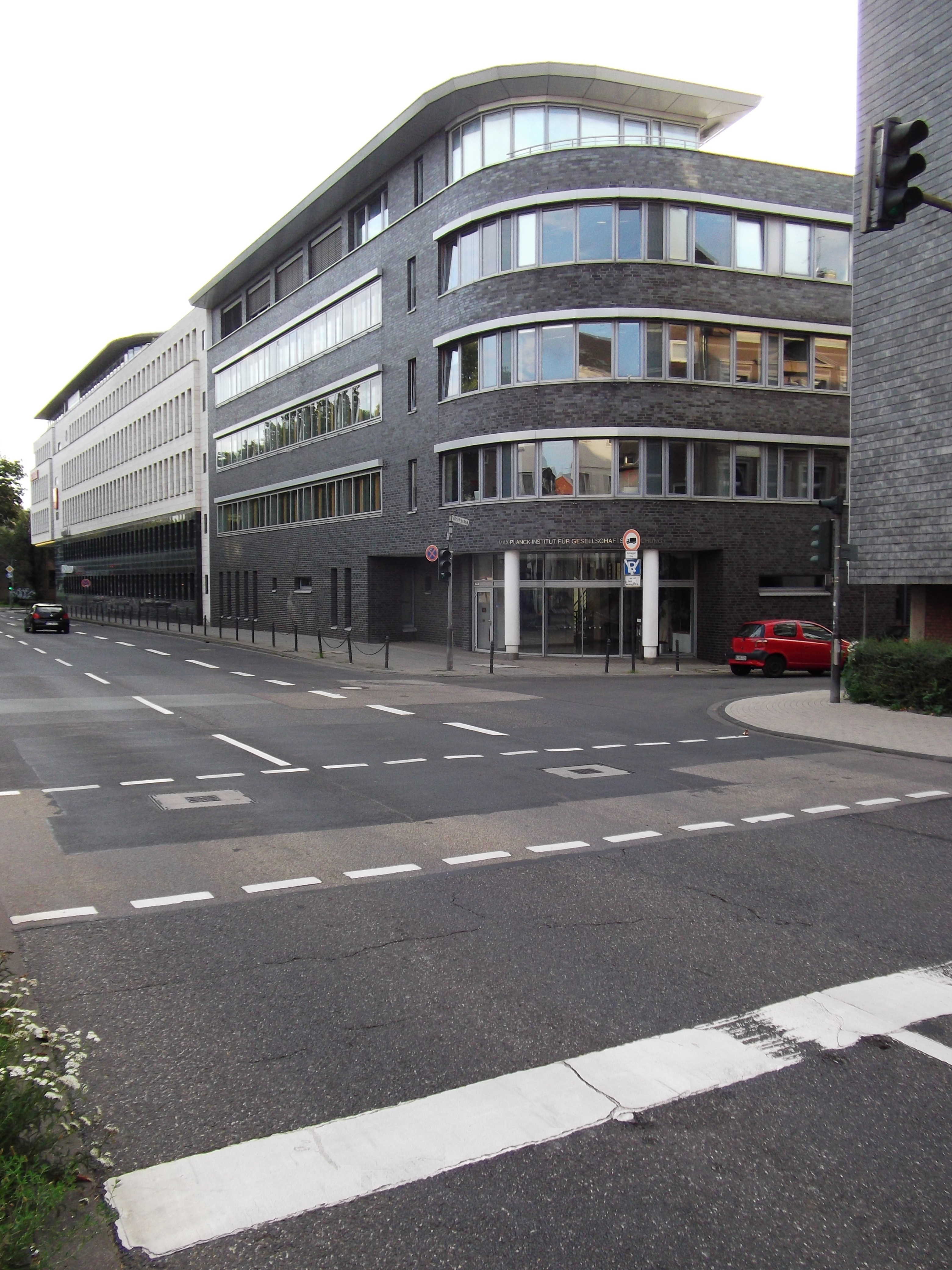 Max-Planck-Institut für Gesellschaftsforschung (Köln)